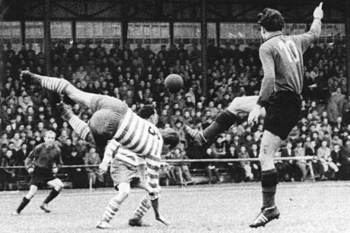 Title: Wismut Karl-Marx-Stadt - Lok Leipzig 1:0 Factual corrections and alternative descriptions are encouraged separately from the original description. Additionally errors can be reported at this page to inform the Bundesarchiv. Original historic description: Zentralbild-Funck-Schlegel Fu-Ho. 12.11.1956 Wismut wurde neuer Fußballmeister - Am Sonntag, dem 11.11.1956, standen sich in Aue im entscheidenden Kampf um die Meisterschaft Wismut Karl-Marx-Stadt und Lok Leipzig gegenüber. Durch einen 1:0-Sieg wurde Wismut neuer Titelträger unserer Republik. UBz: Eine glänzende Abwehrparade von "Binges" Müller (Wismut). Wir erkennen von links: Palitzsch (Lok), S. Wolf, Müller (beide Wismut) und Konzack (Lok)."